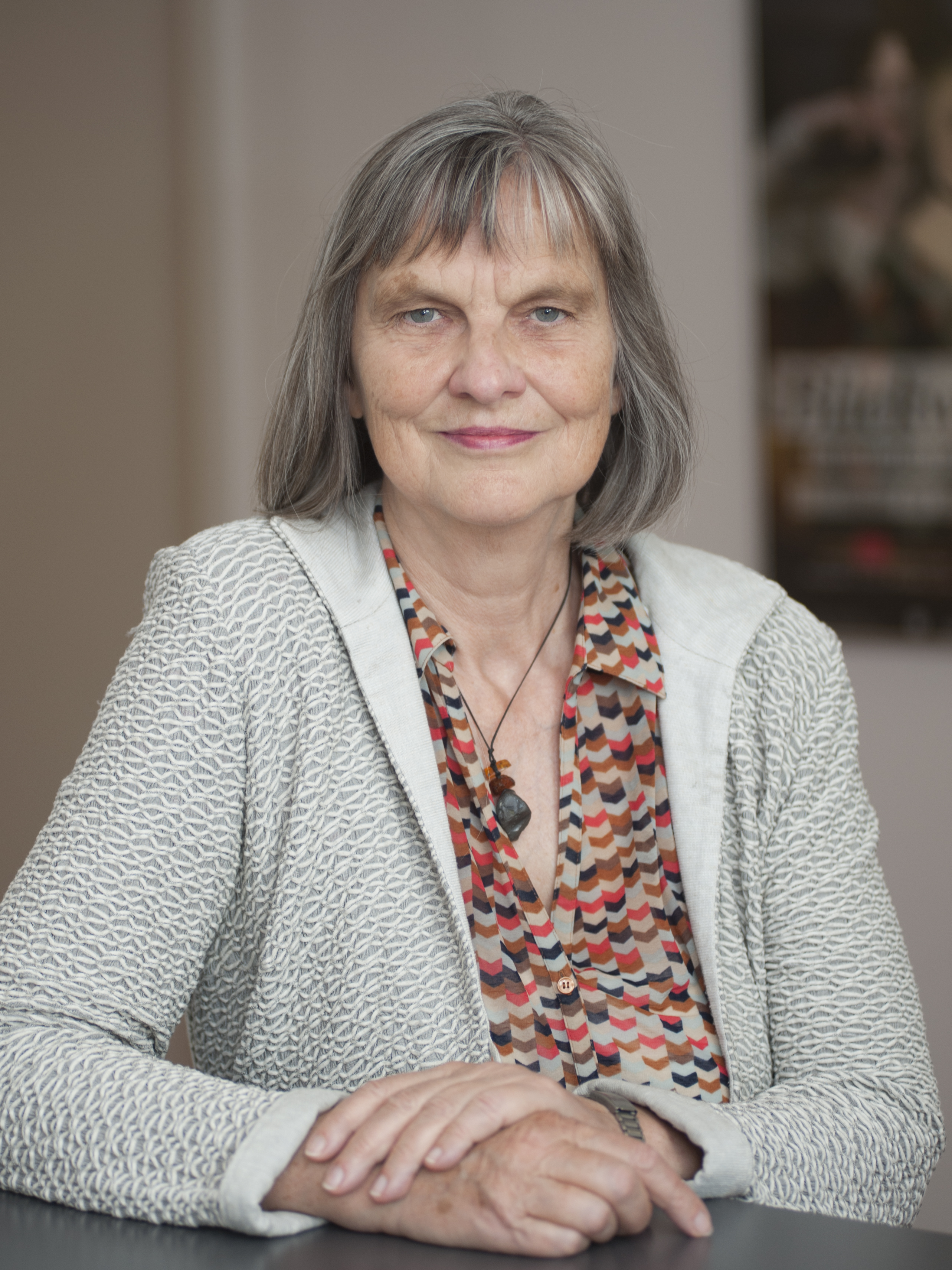 Die Juristin Sibylla Flügge fotografiert von Petra Bruder (2019)